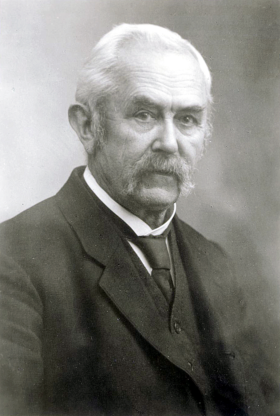 Korla Bohuwěr Šěca (1858–1938)